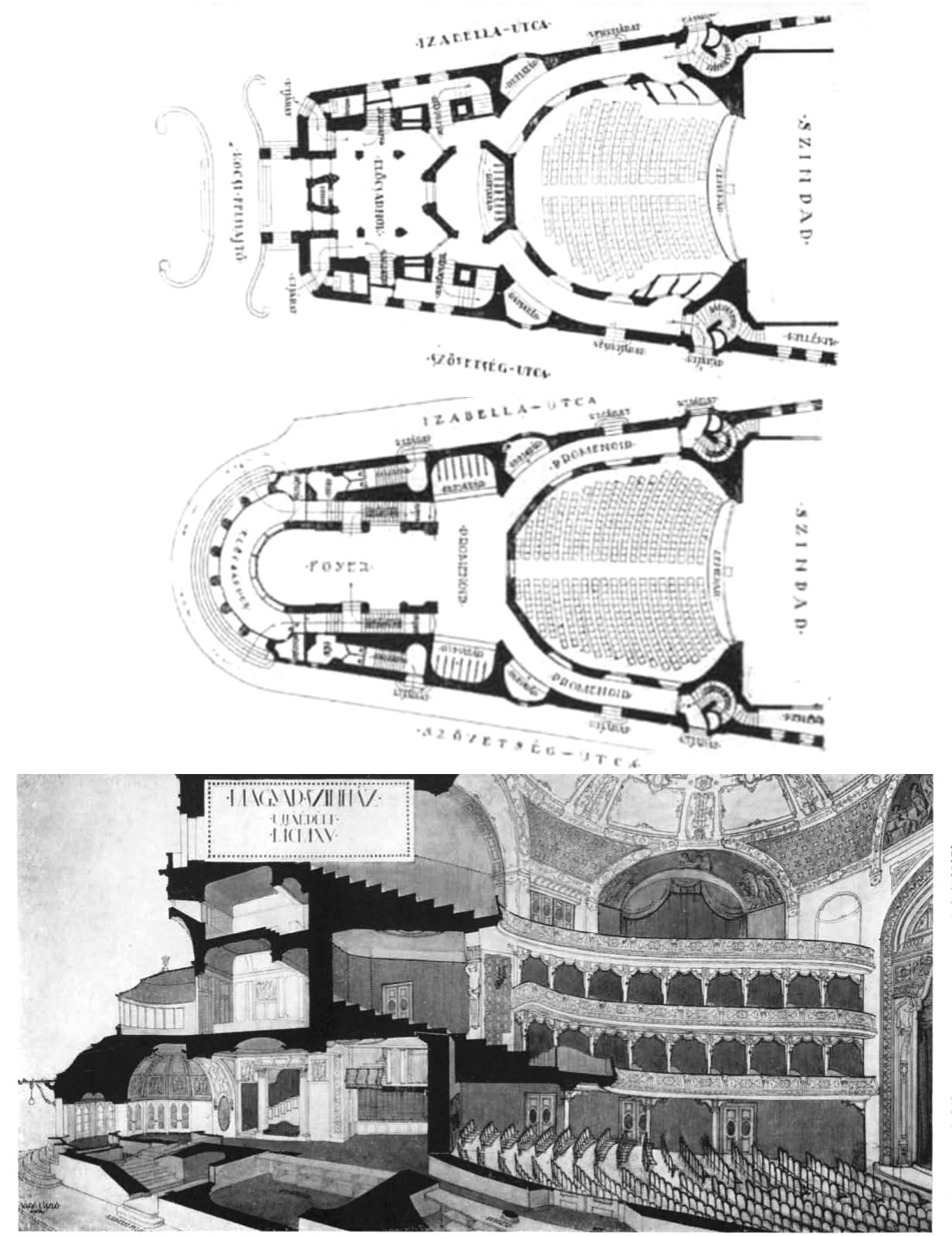 A budapesti Magyar Színház egy részének régi (fent) és Vágó László tervei szerint átalakított új (középen) alaprajza az átalakított rész metszetének távlati képével (lent)